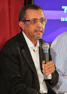 Yahya Ould Ahmed El Waghef, Président du parti mauritanien ADIL (Pacte National pour la Démocratie et le Développement).